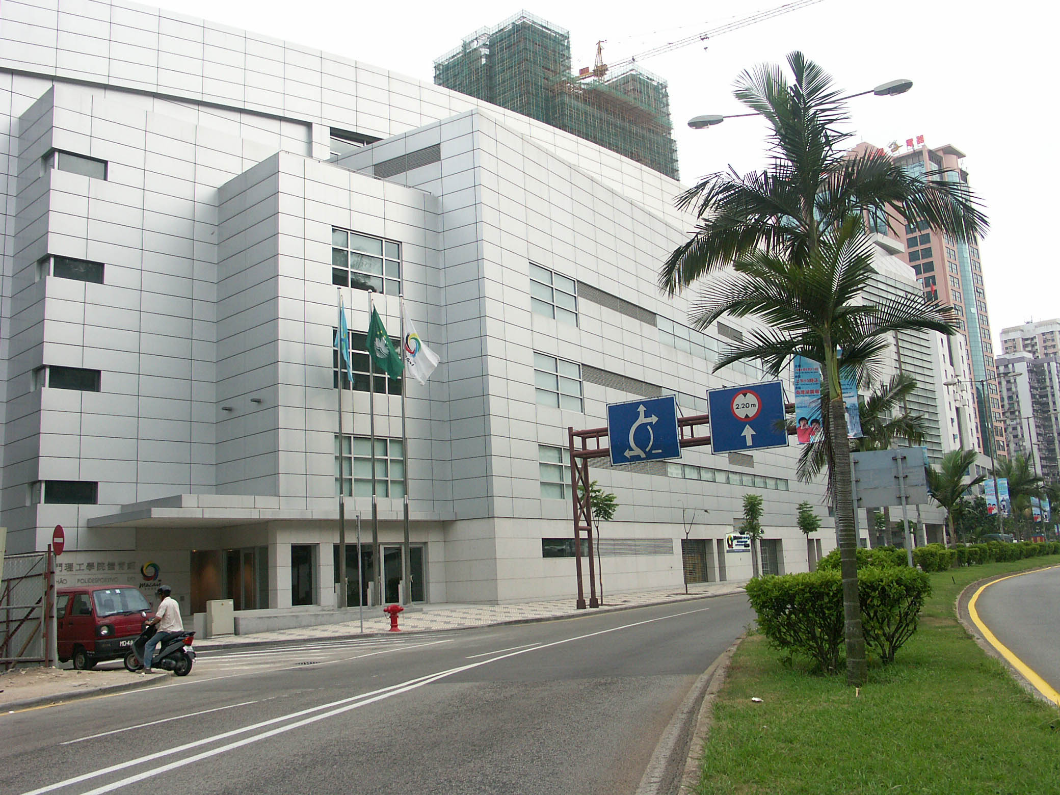 Pavilhão Polidesportivo do Institito Politécnico de Macau